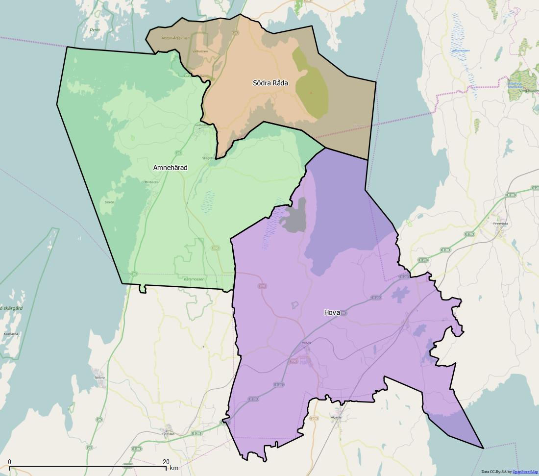 Distriktsindelningen i Gullspångs kommun